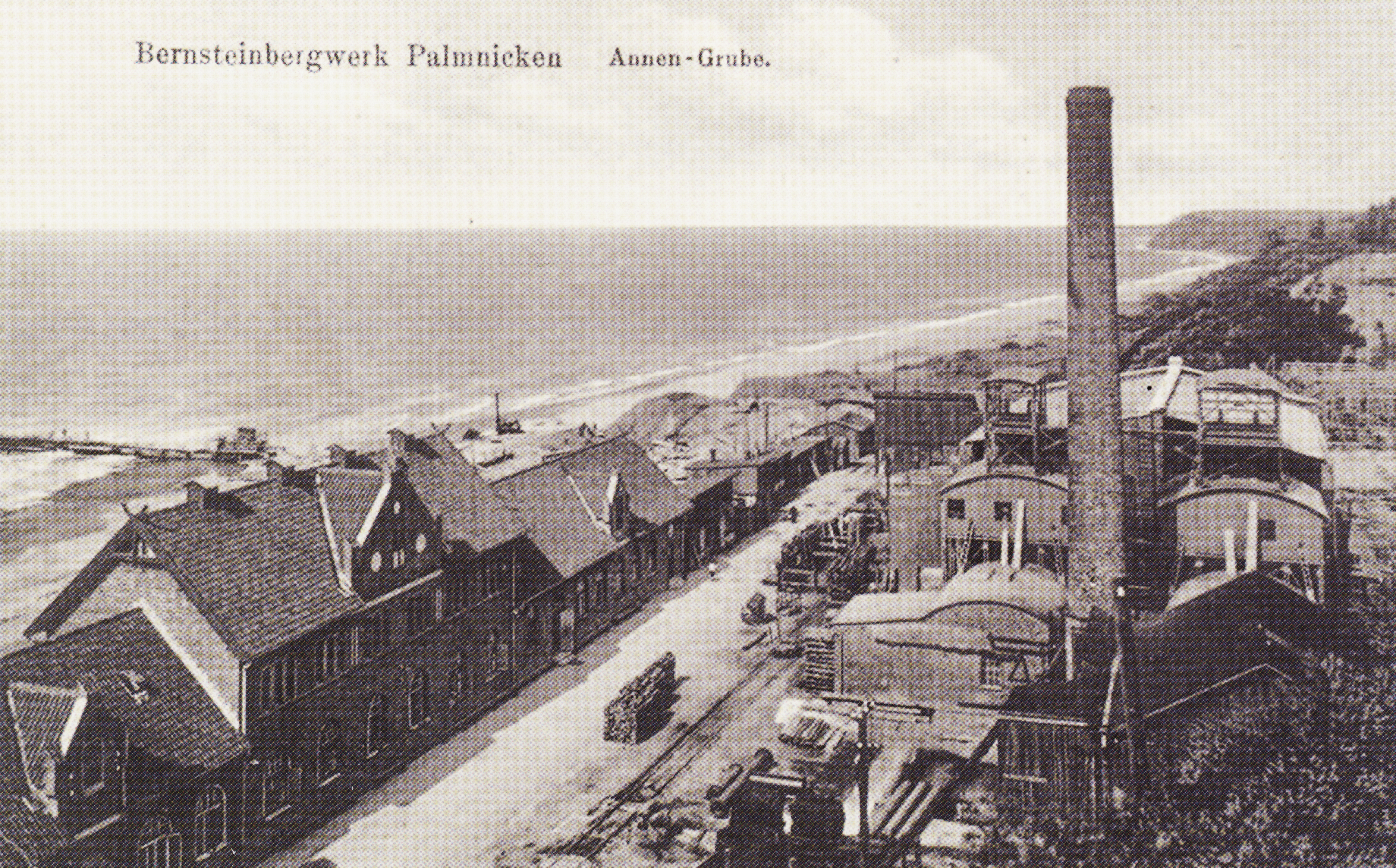 Шахта Анна. Пальмникен (ныне пос. Янтарный). Фото 1910 г. Открыта в 1883 году, закрыта в 1923.